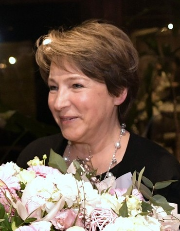 Татьяна Юмашева в день рождения 17 января 2020 года. Во время поздравления Президентом России Владимиром Путиным